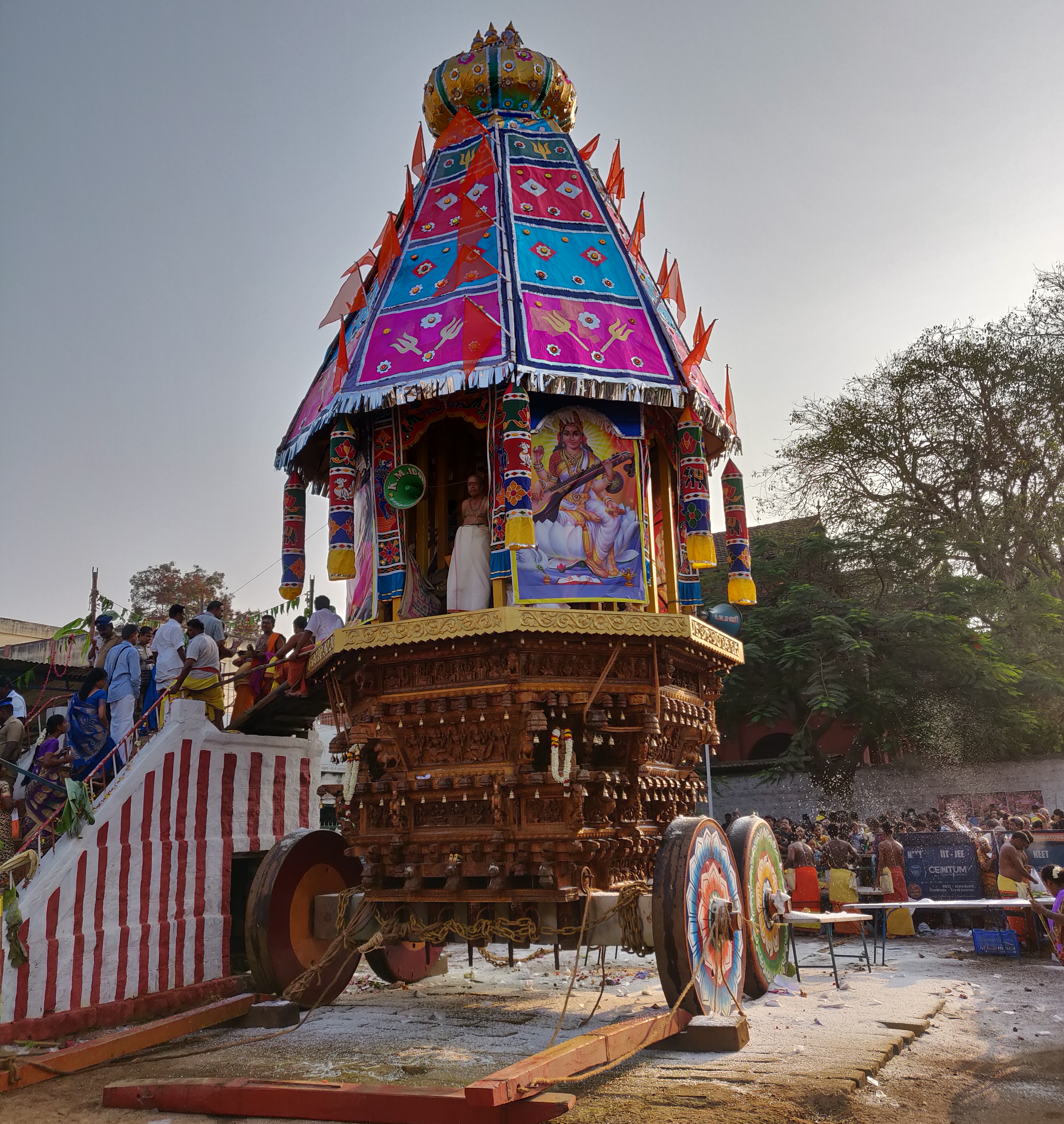 கோயமுத்தூர் கோனியம்மன் கோயில் தேர். தேர் ராஜ் வீதியில். 06.03.2019